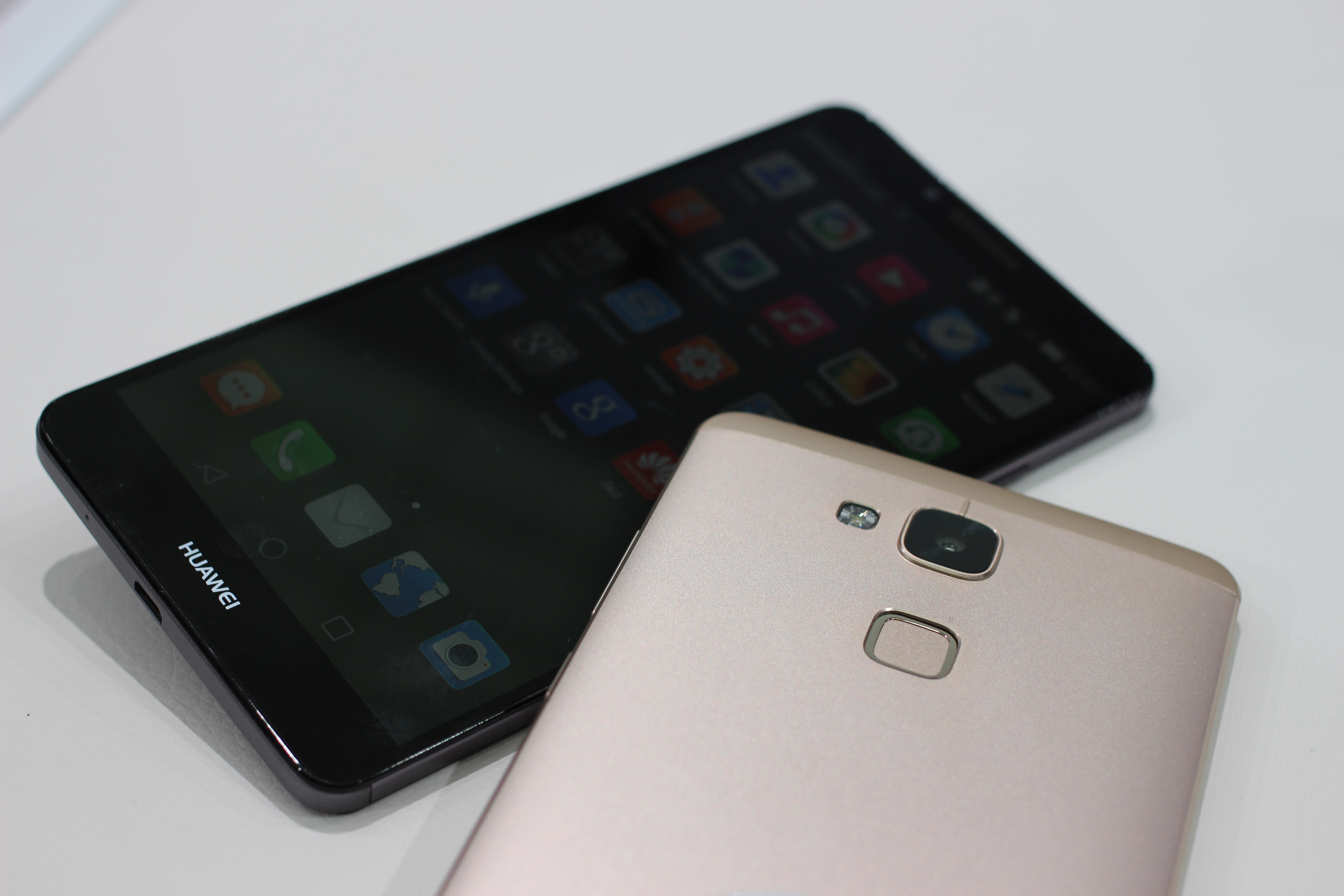 Huawei Ascend Mate 7